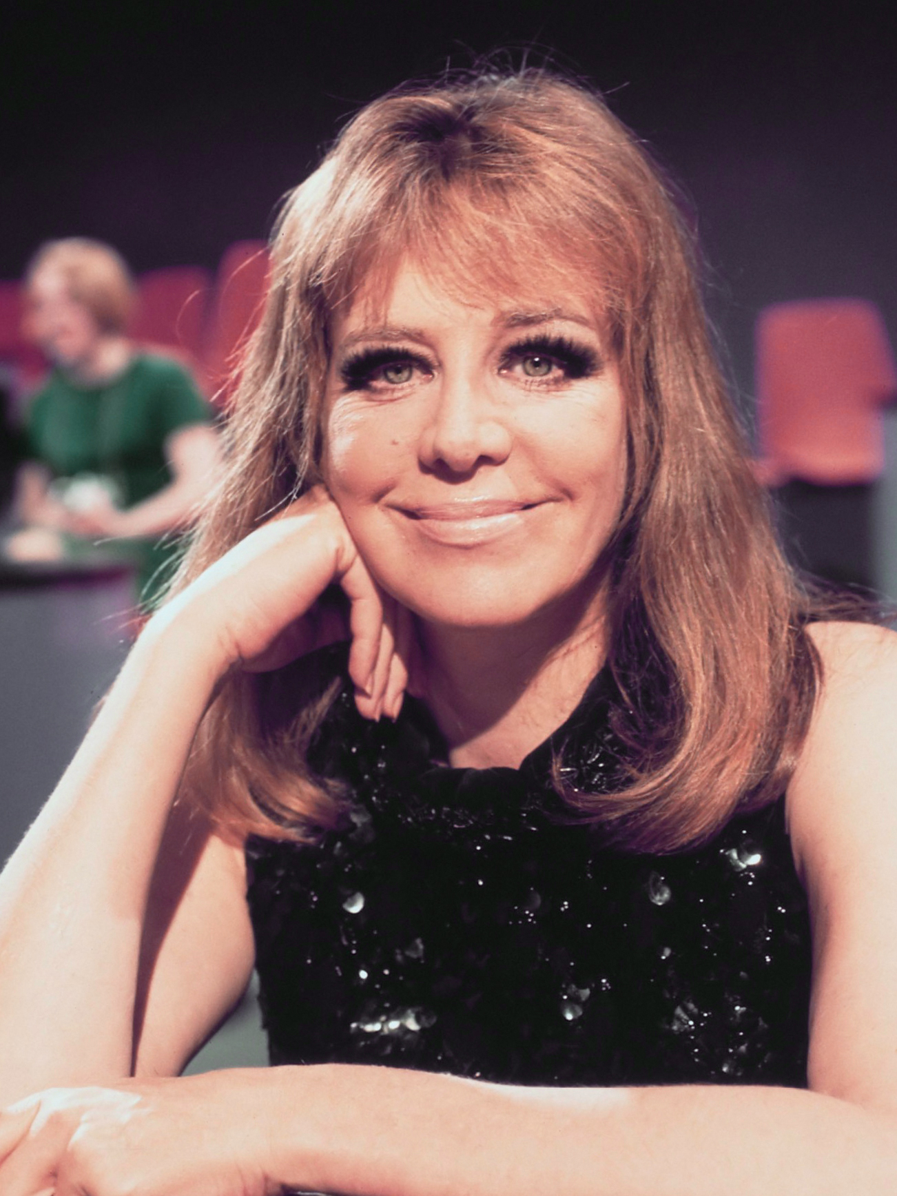 Duitse zangeres Hildegard Knef maakt TV opnamen 14 maart 1969